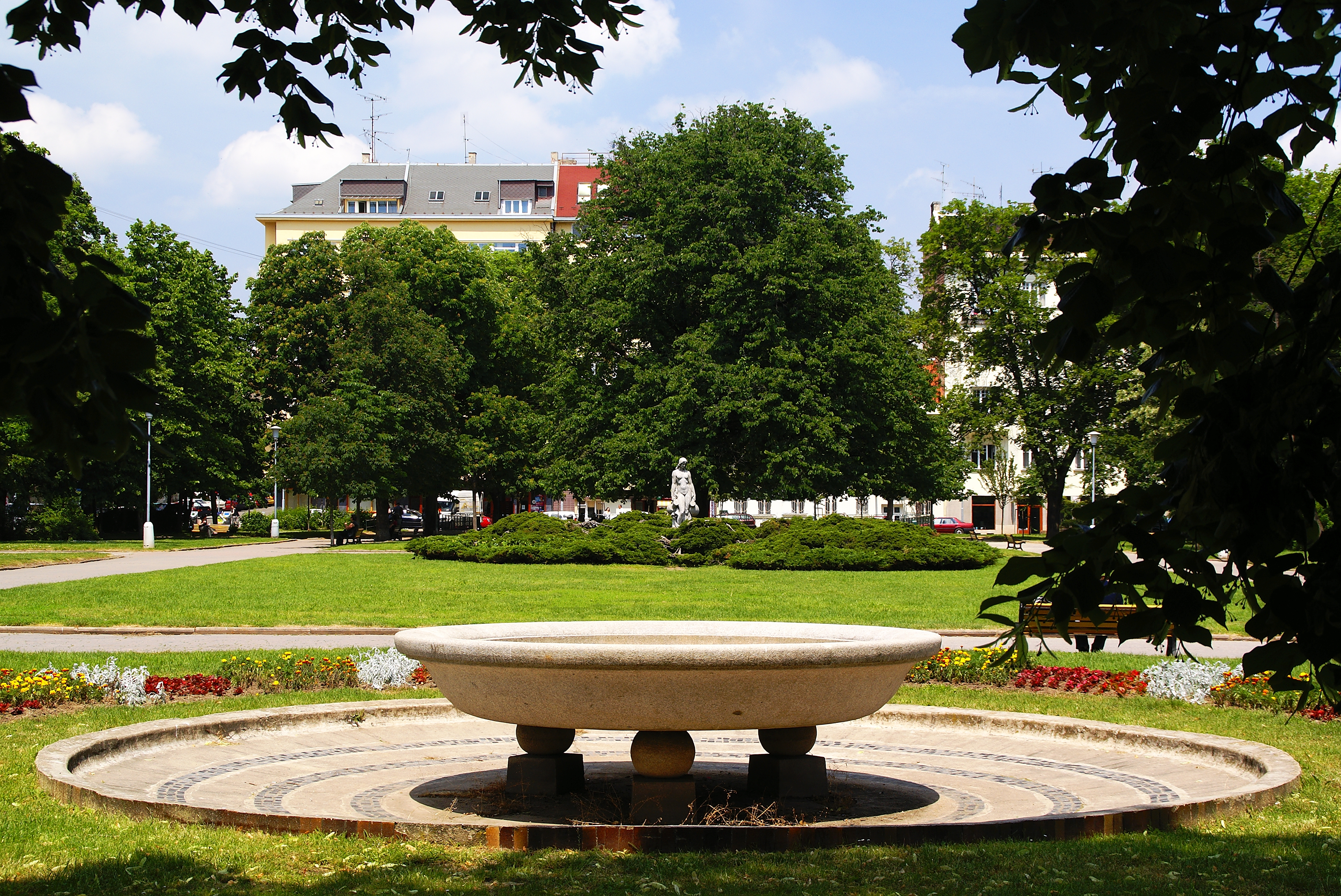 Obilní trh, náměstí s parkem v Brně.